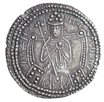 Срібляник Володимира Великого